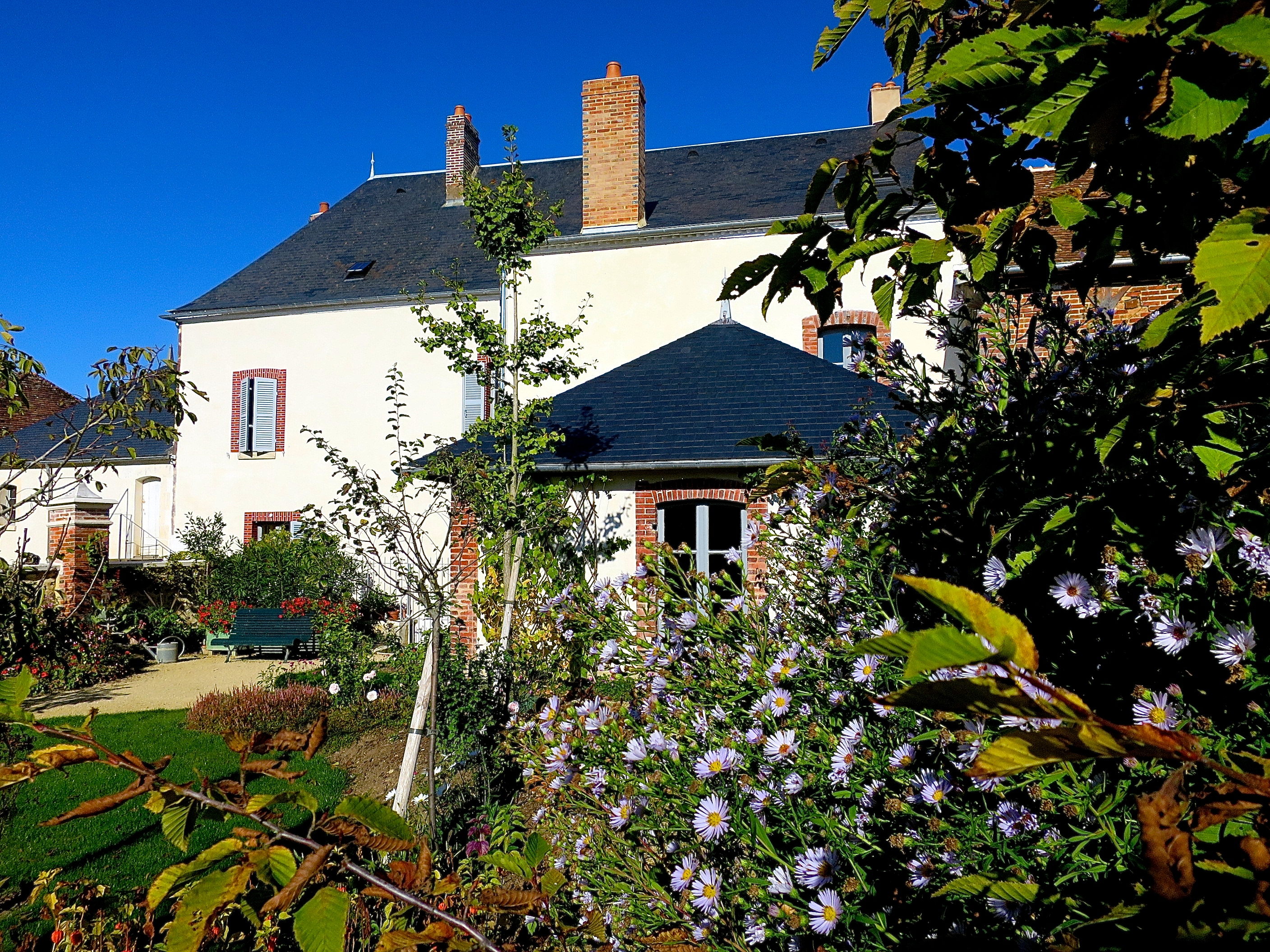 La façade arrière de la maison de Colette vue des jardins